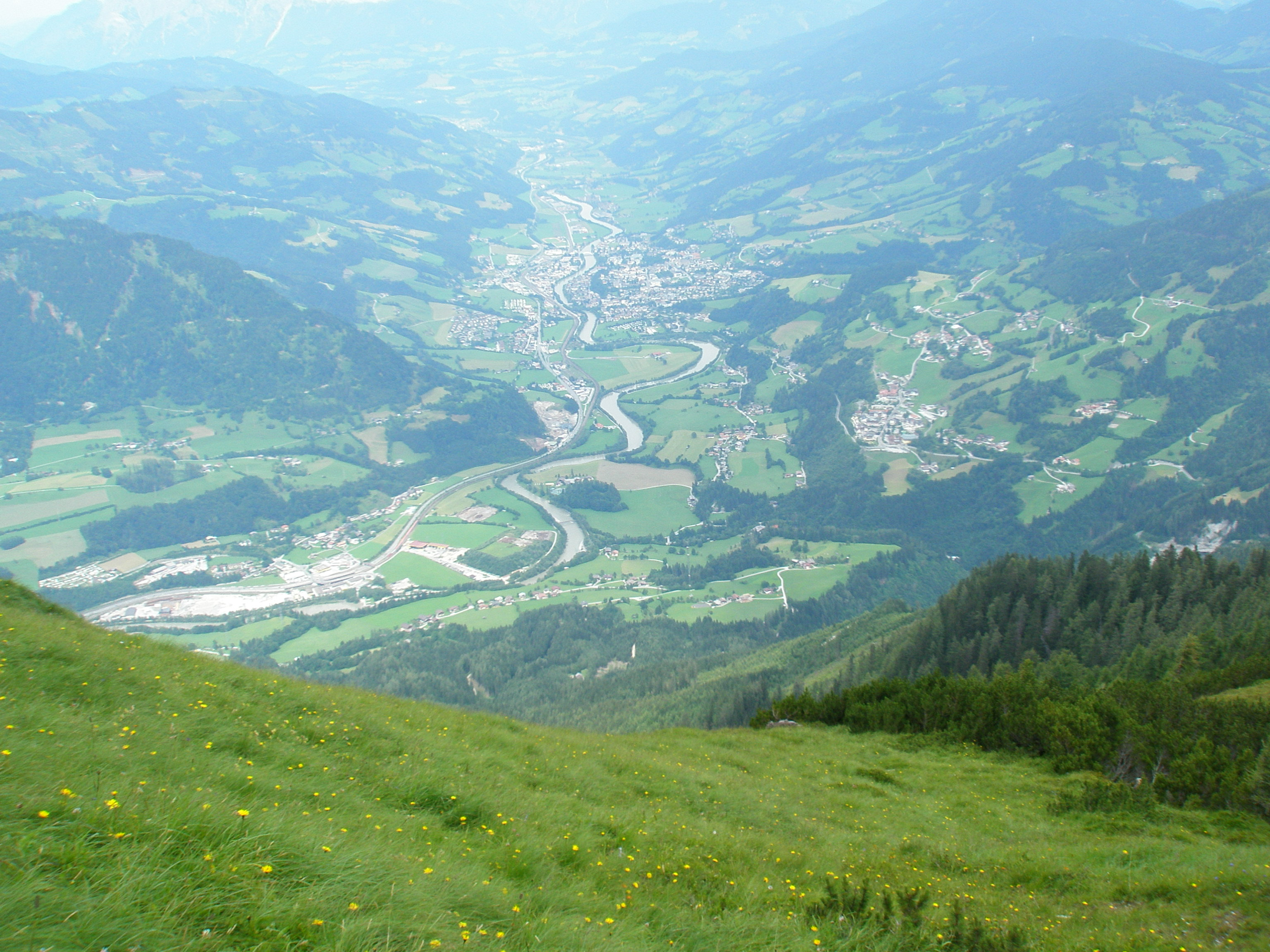 Sankt Johann im Pongau von oben